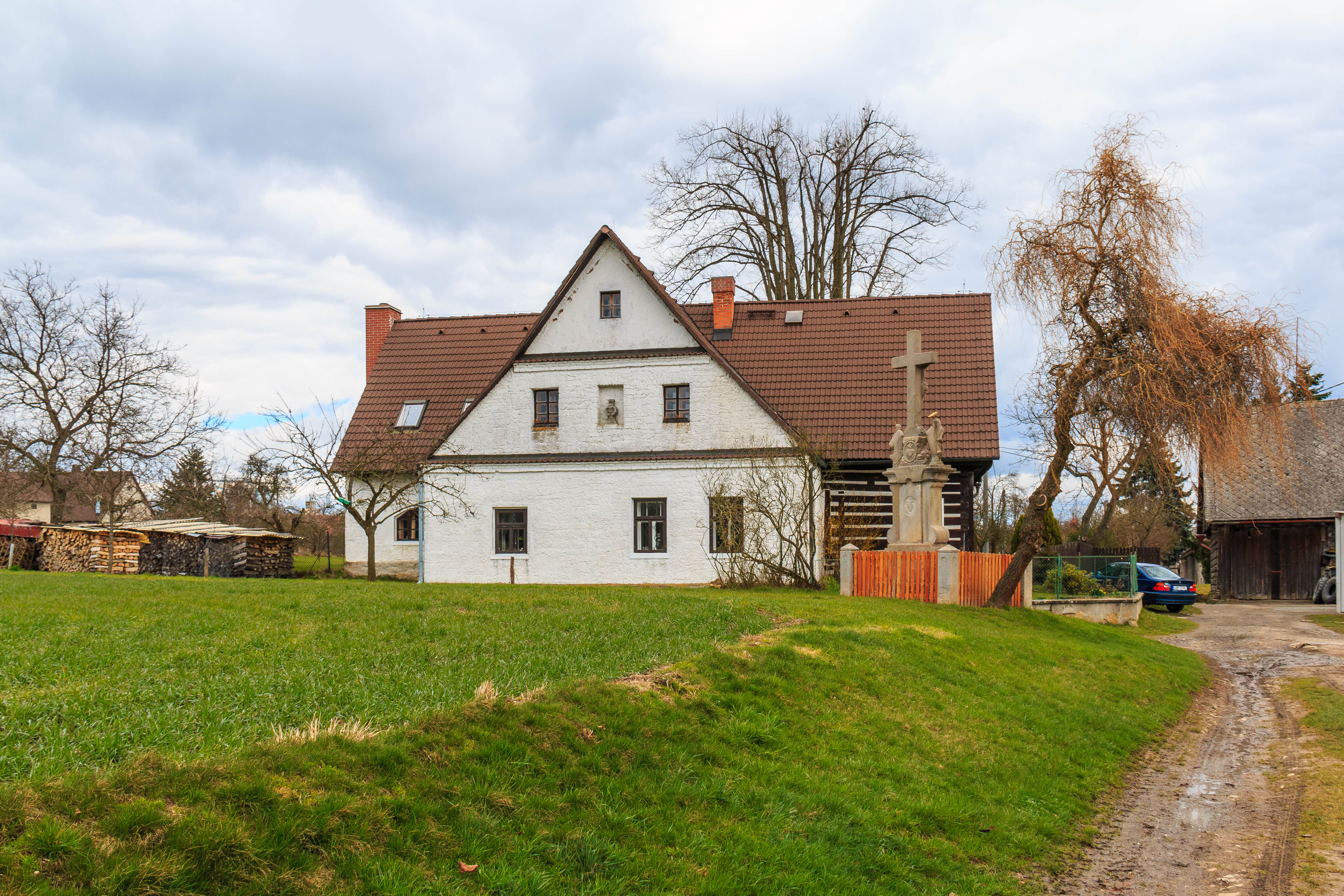 Újezdec u Lhoty pod Hořičkami čp. 3